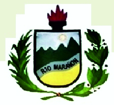 Escudo de la Provincia de Huacaybamba